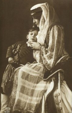 Carte postale souvenir - Marie Bonaparte et son fils Pierre de Grèce en costume traditionnel crètois